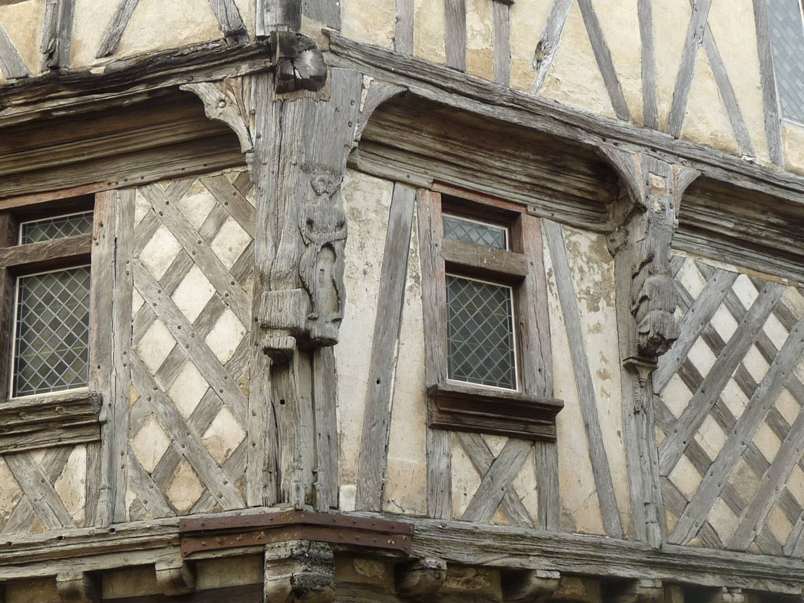 détail de la Maison de Lieutenance (15è s.), Vieux Cognac, Charente, France